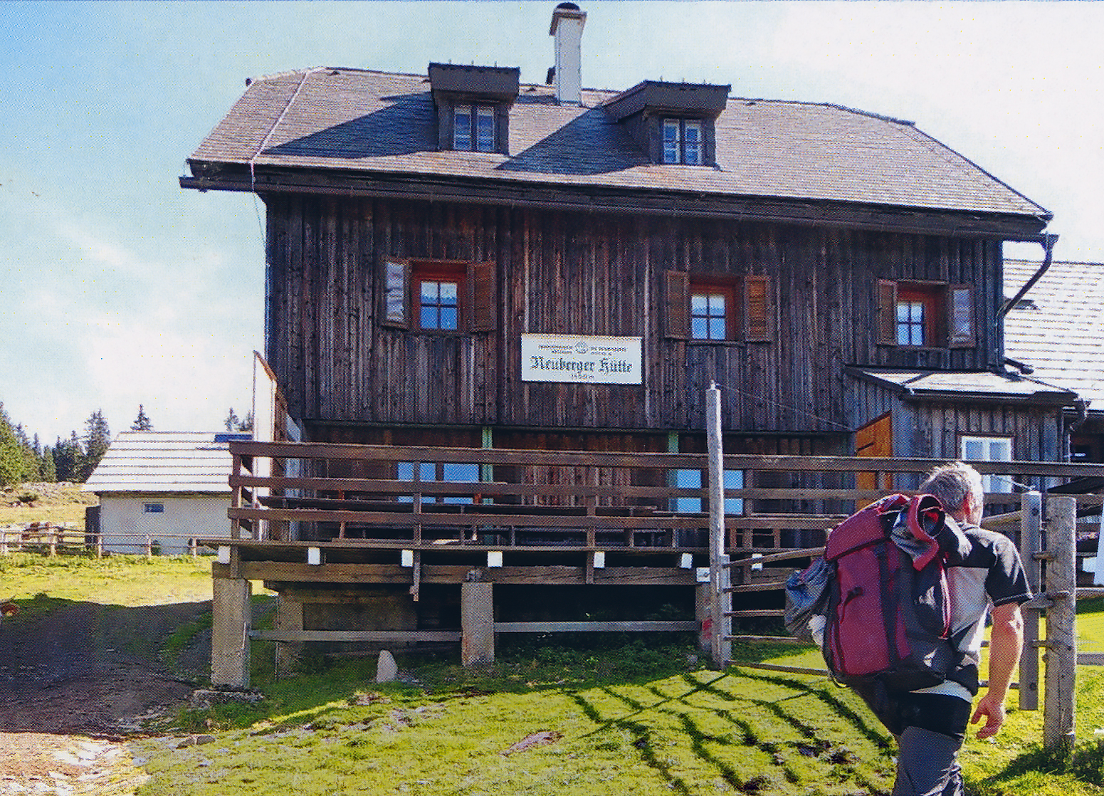 Neuberger Hütte (Naturfreunde), Hinteralm 37, A-8693 Scheiterboden